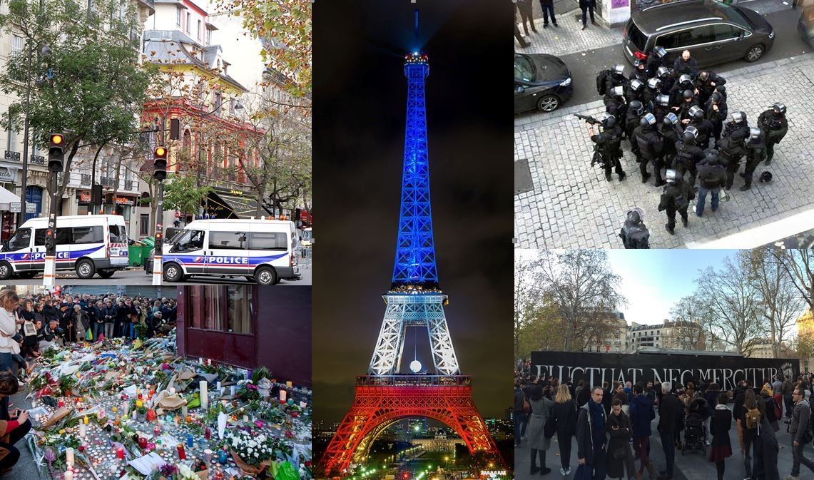 montage de photos WP autour des attentats du 13 novembre 2015 en France